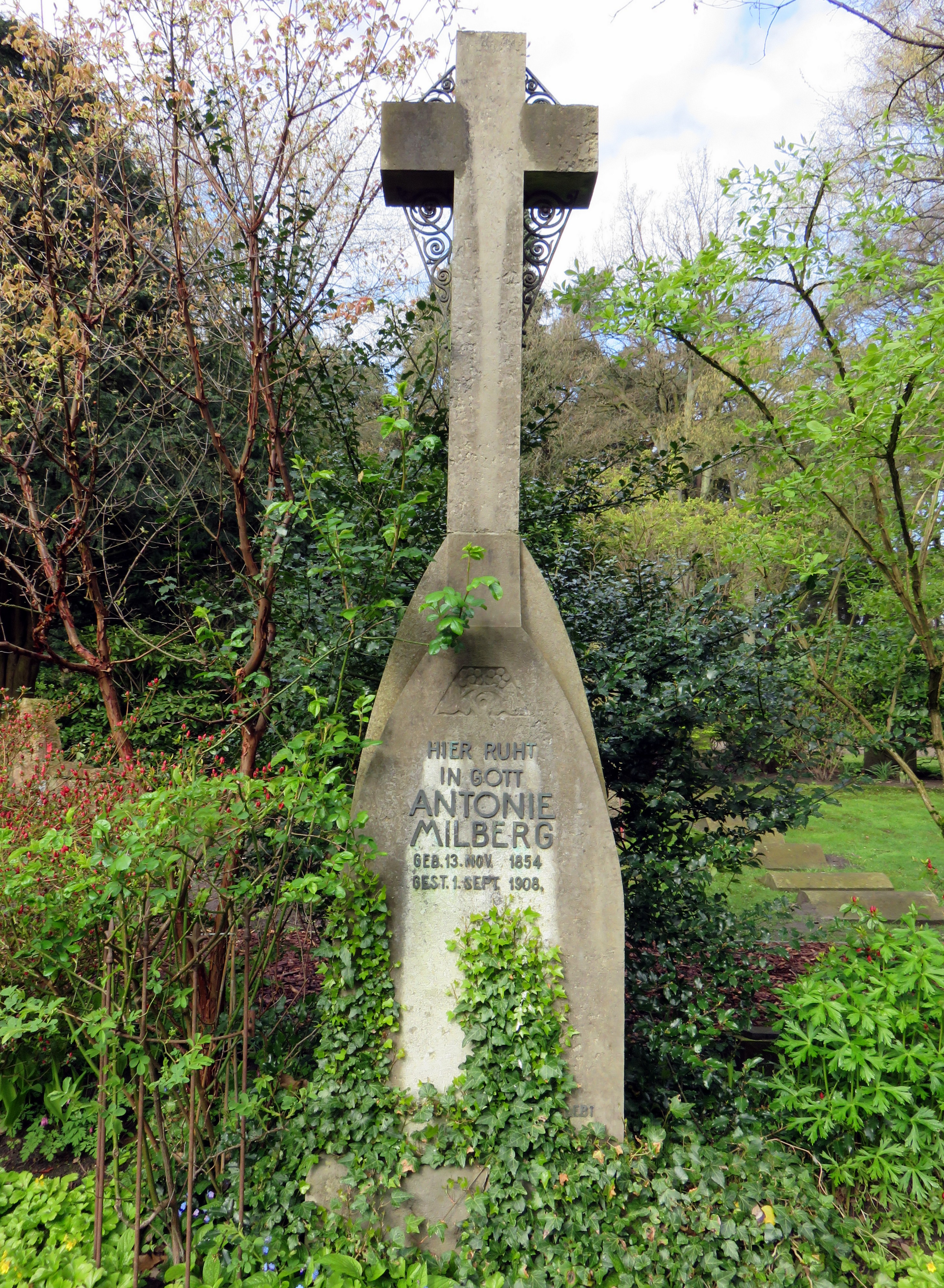 Historischer Grabstein der deutschen Pädagogin Antonie Milberg im Bereich des Gartens der Frauen auf dem Ohlsdorfer Friedhof in Hamburg-Ohlsdorf.